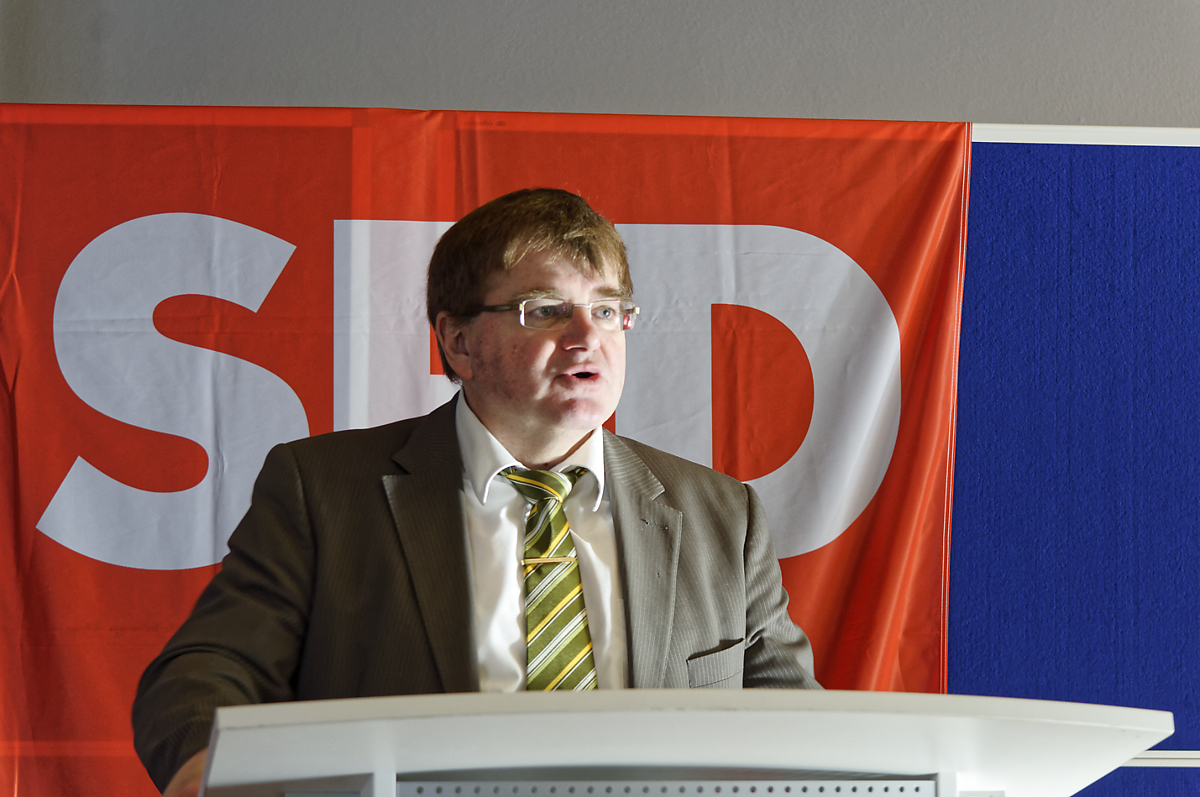 Harry Scheuenstuhl (* 1961 in Wilhermsdorf) ist ein deutscher Landespolitiker (SPD). Seit 2013 ist er Mitglied des Bayerischen Landtag.